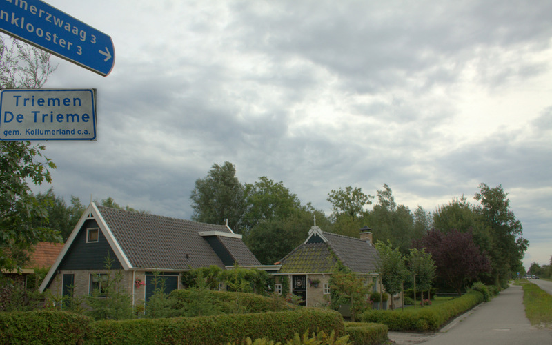 Buurtschap gezicht van het wijd verspreide buurtschap Triemen.